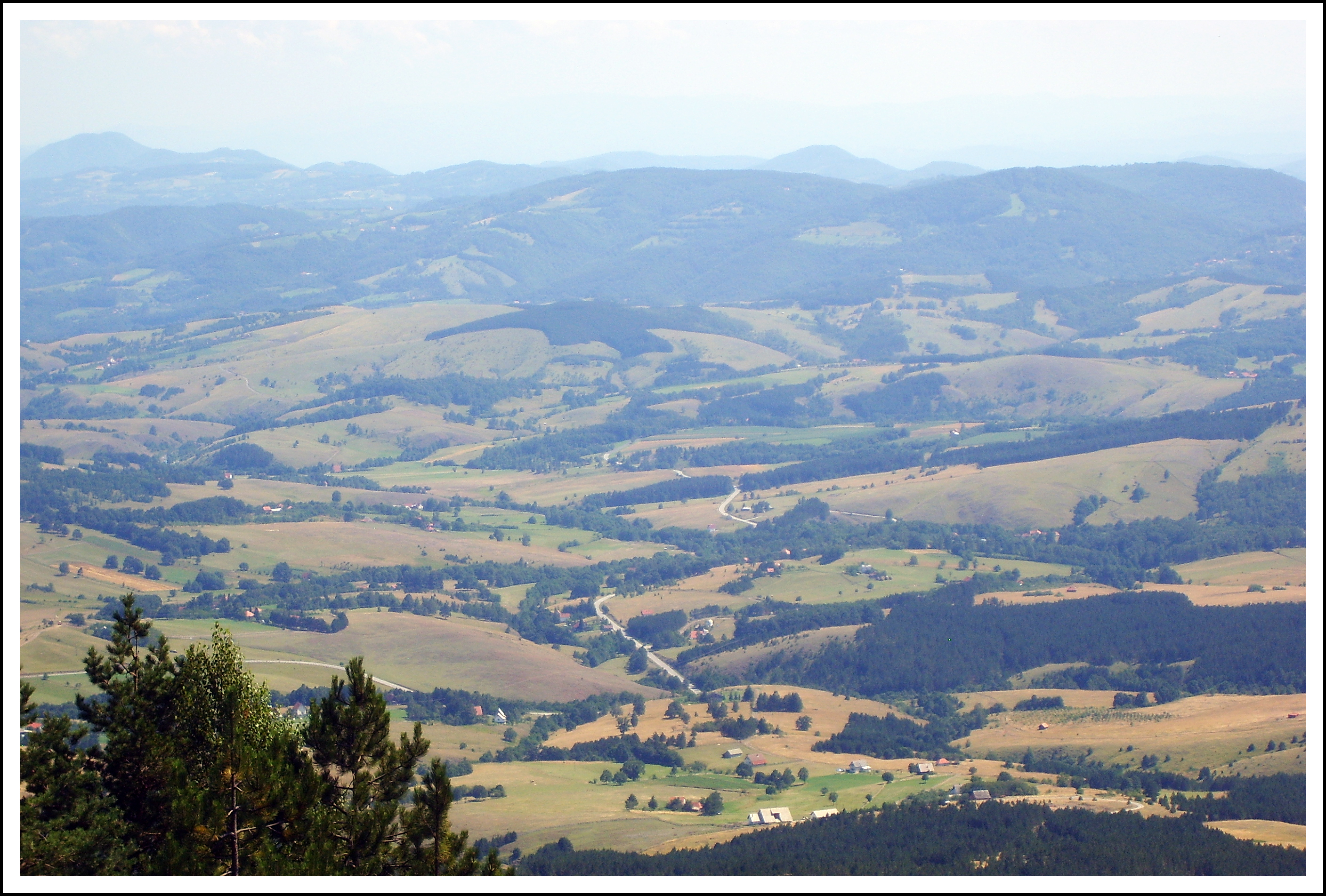 Crni Vrh Divcibare Maljen ... 1098mnv